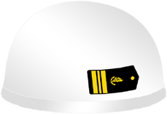 IDF Navy Rav-Seren Helmet